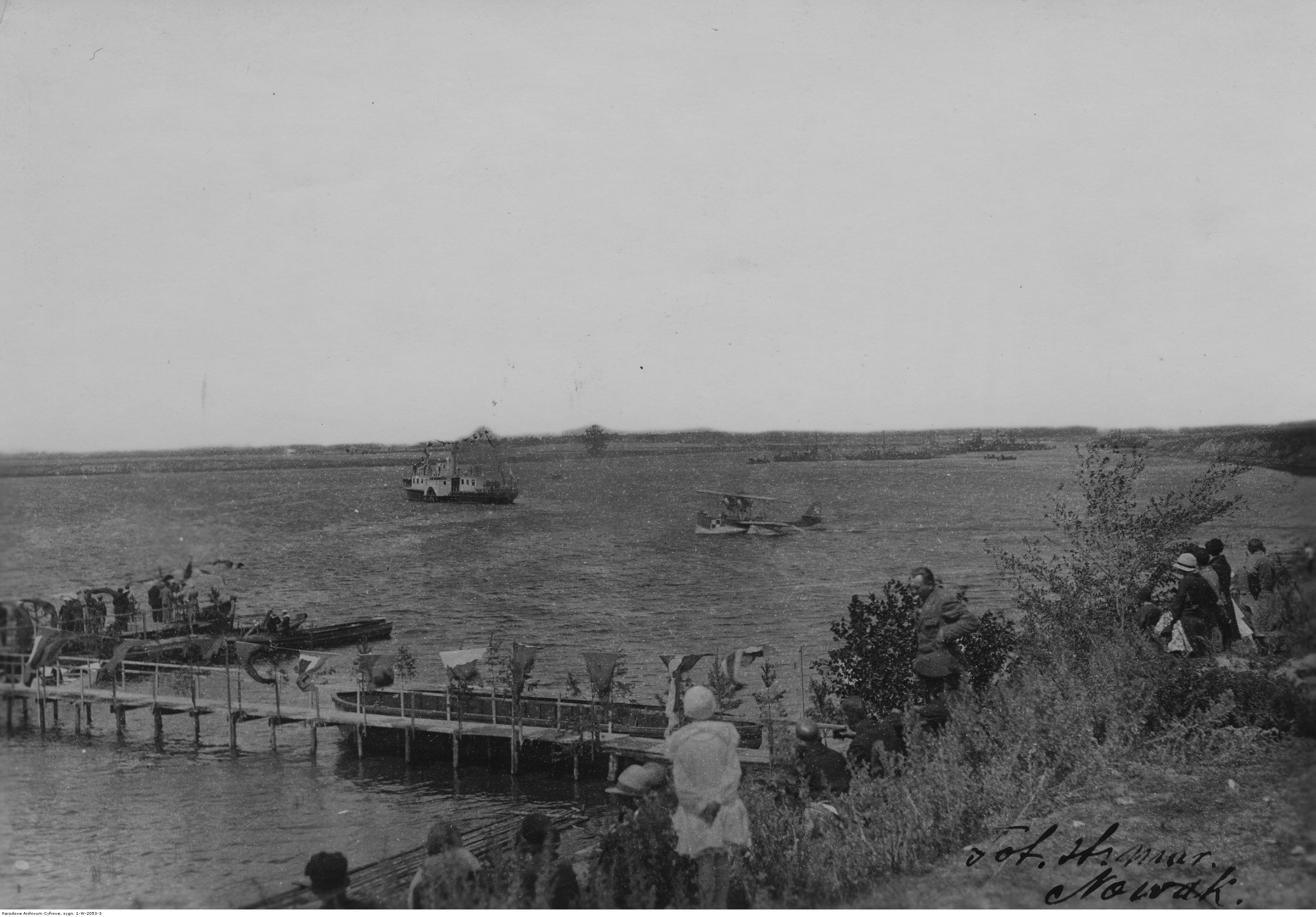 Gala Flotylli Pińskiej na jeziorze Horodyskim. Widoczny wodnosamolot LeO H.135B3 i okręt sztabowy ORP "Admirał Sierpinek".